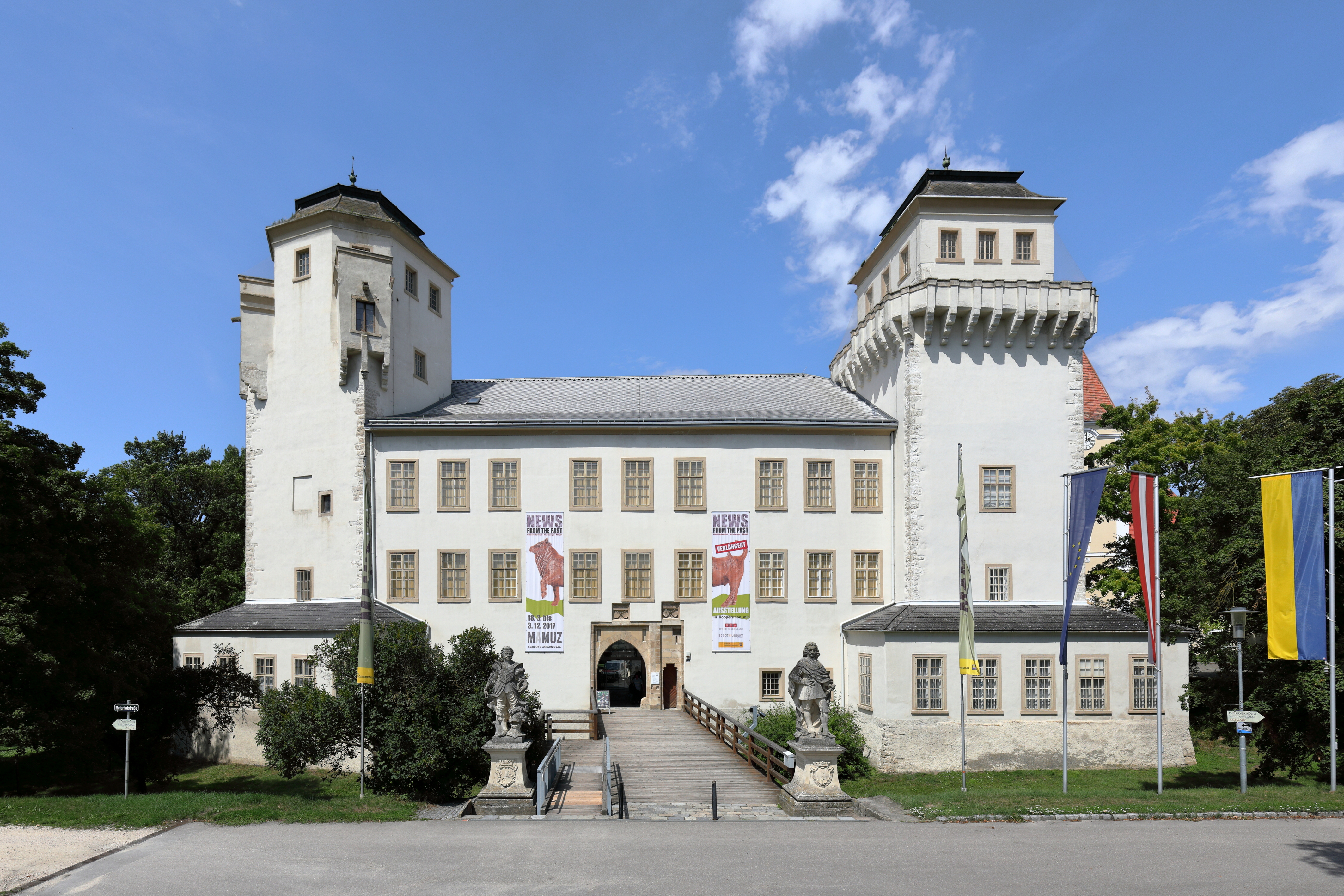 Südansicht des Schlosses Asparn in der niederösterreichischen Marktgemeinde Asparn an der Zaya.Ursprünglich eine vierflügelige Wasserburg mit 2 mächtigen Ecktürmen im Süden. 1645 durch die Schweden zerstört und 1651 teilweise Neuerrichtung. 1717 erfolgte eine Umgestaltung und 1820 wurde der Nordflügel abgetragen.Am 5. Juni 1970 wurde im Schloss ein Urgeschichtliches Museum eröffnet. Um 2012/2014 erfolgte der Zusammenschluss mit dem Museumszentrum Mistelbach zum Mistelbach-Asparn-MUseumsZentrum (MAMUZ).